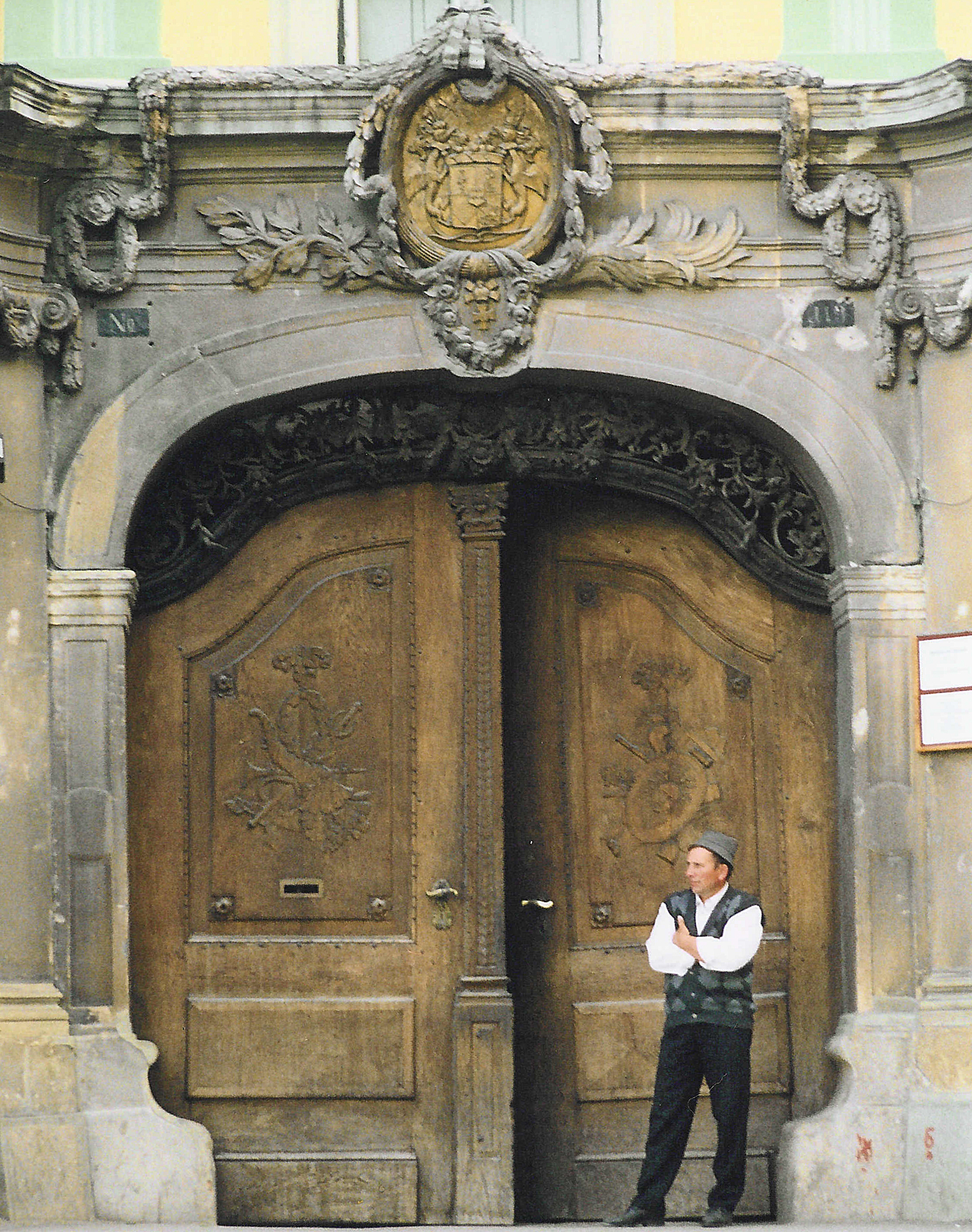 Entrance, Brukenthaler Palace, Piaţa Mare (Large Square), Sibiu, Romania.